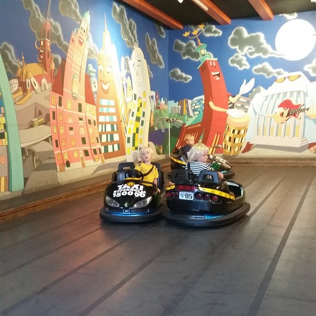 Barnradiobilarna på Gröna Lund i Stockholm.